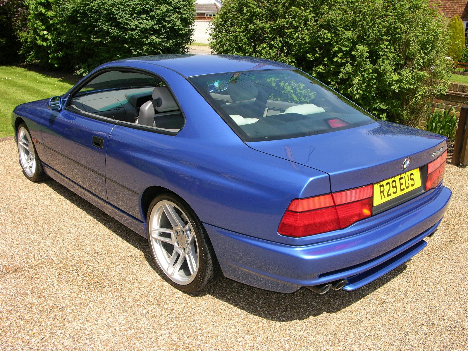 BMW E31 840Ci Sport